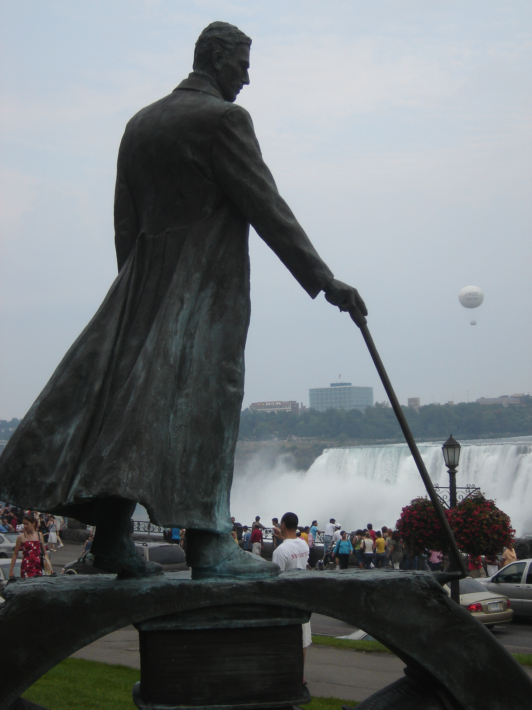 Фотографисао Јакша Поповић на Нијагара Фолсу, Канада, 6. августа 2006.